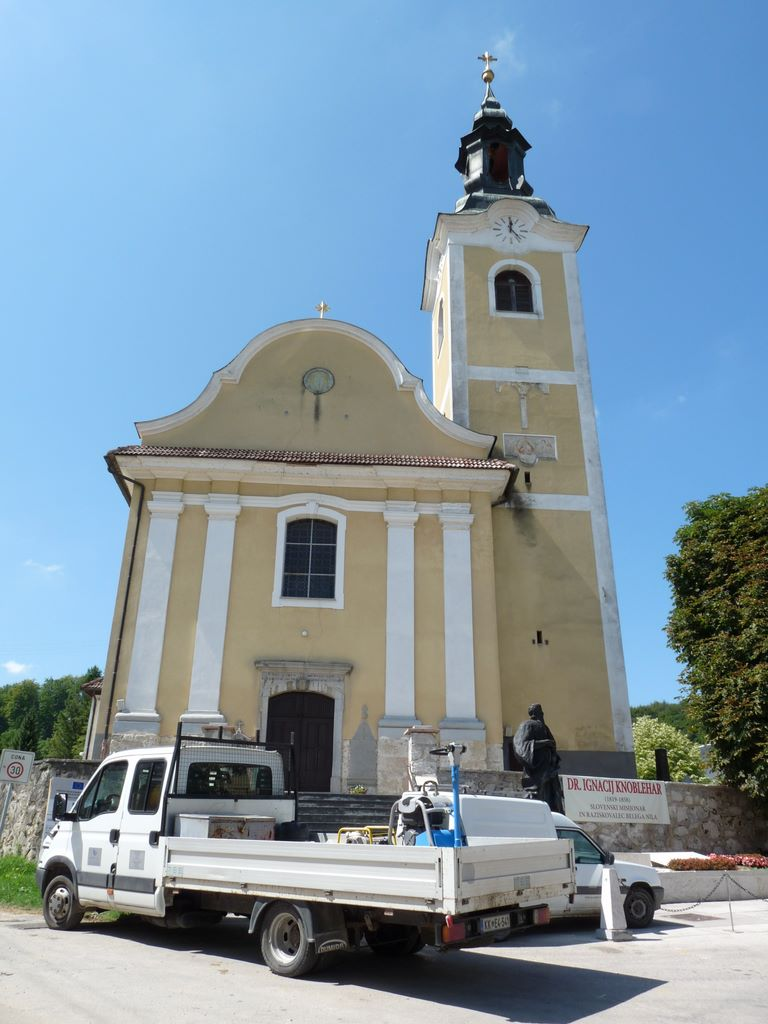 Sveti Kancijan v Škocjanu